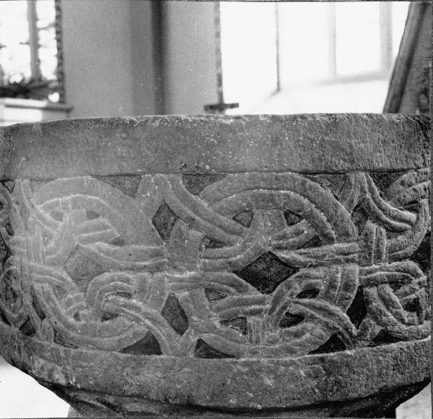 Dopfunt, sandsten, senare delen av 1100-talet, detalj av cuppan. Kategori: (04) DopfuntarDopfunt, sandsten, senare delen av 1100-talet, detalj av cuppan.